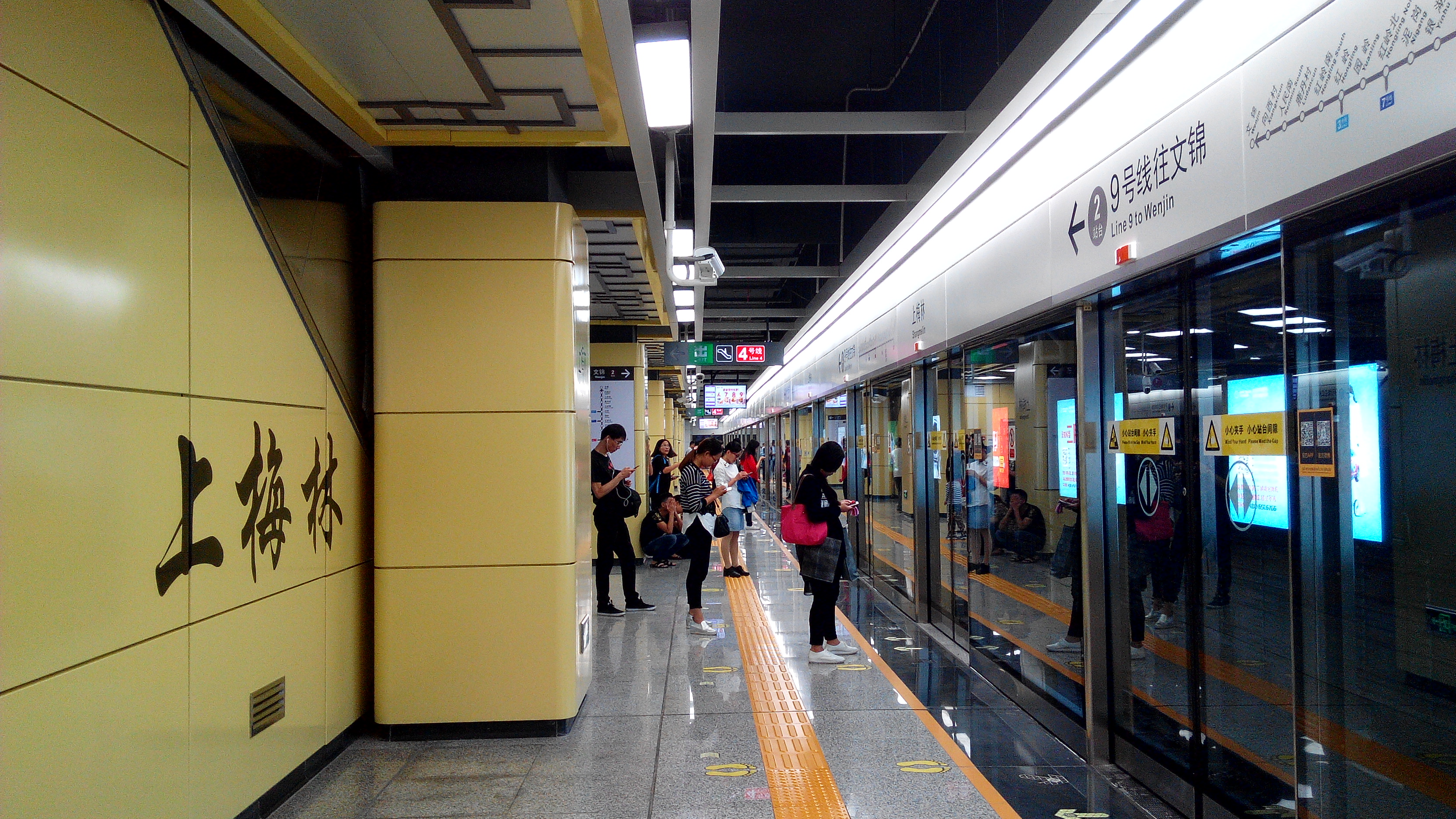 深圳地铁9号线 上梅林站2号站台